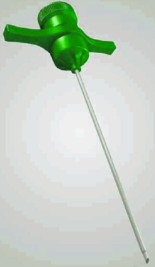 Aguja de Jamshidi, las mas utilizada para realizar biopsias de medula osea ("tuetano del hueso").